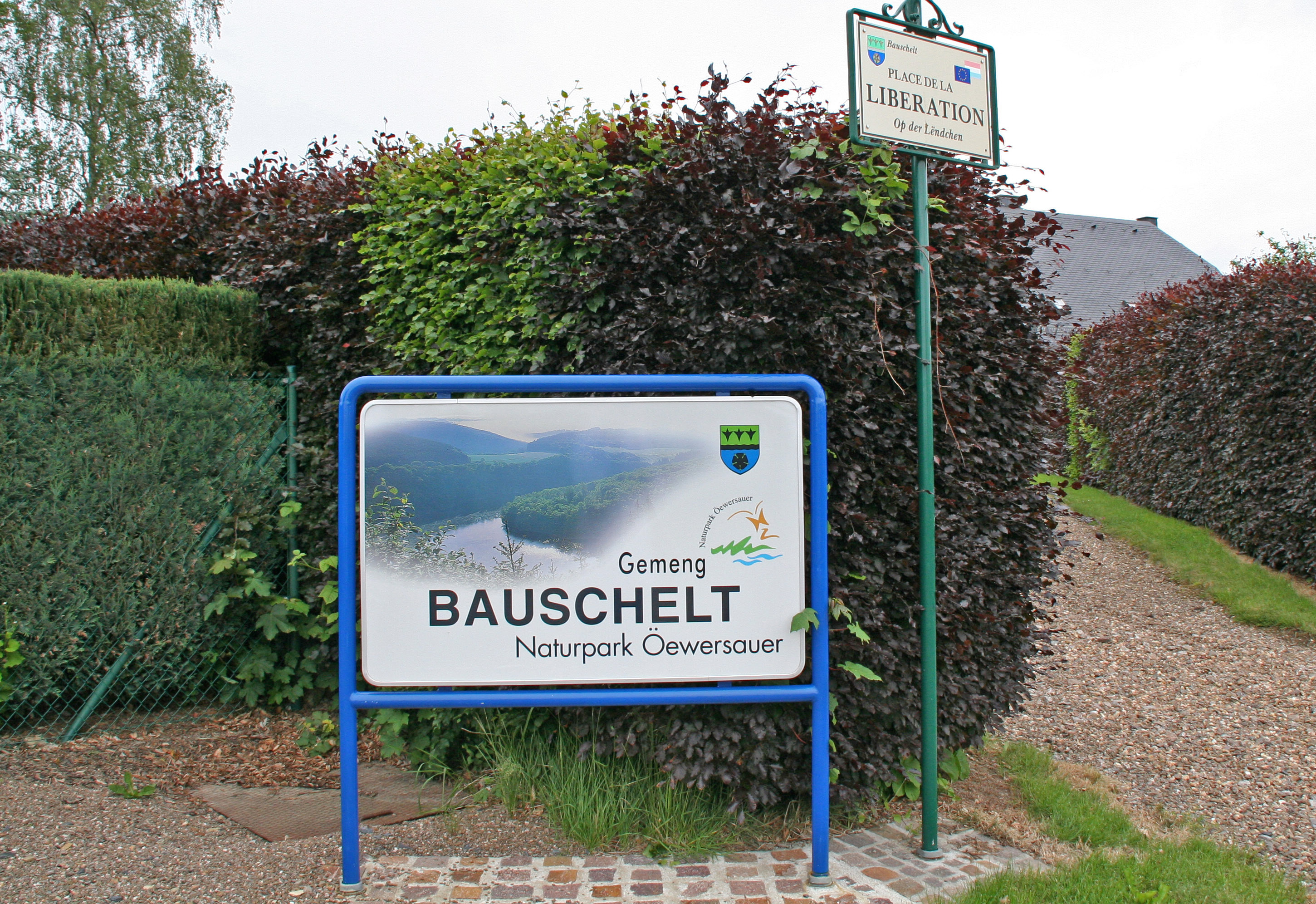 Naturparkschëld zu Bauschelt Source:Eege Foto vum User:Cornischong Lizenz:GFDL Kategorie:Gemeng Bauschelt